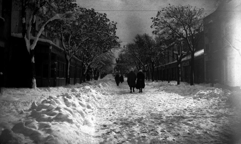 Batna en février, 1935, sous la neige. au fond de la rue en peux voire le monument aux morts.